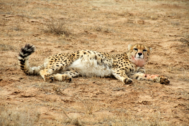 کوشکی در جال استراحت پس از شکار